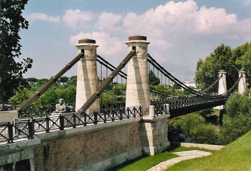 Ponte "Real Ferdinando" sul Garigliano by Domenico Iannantuoni and